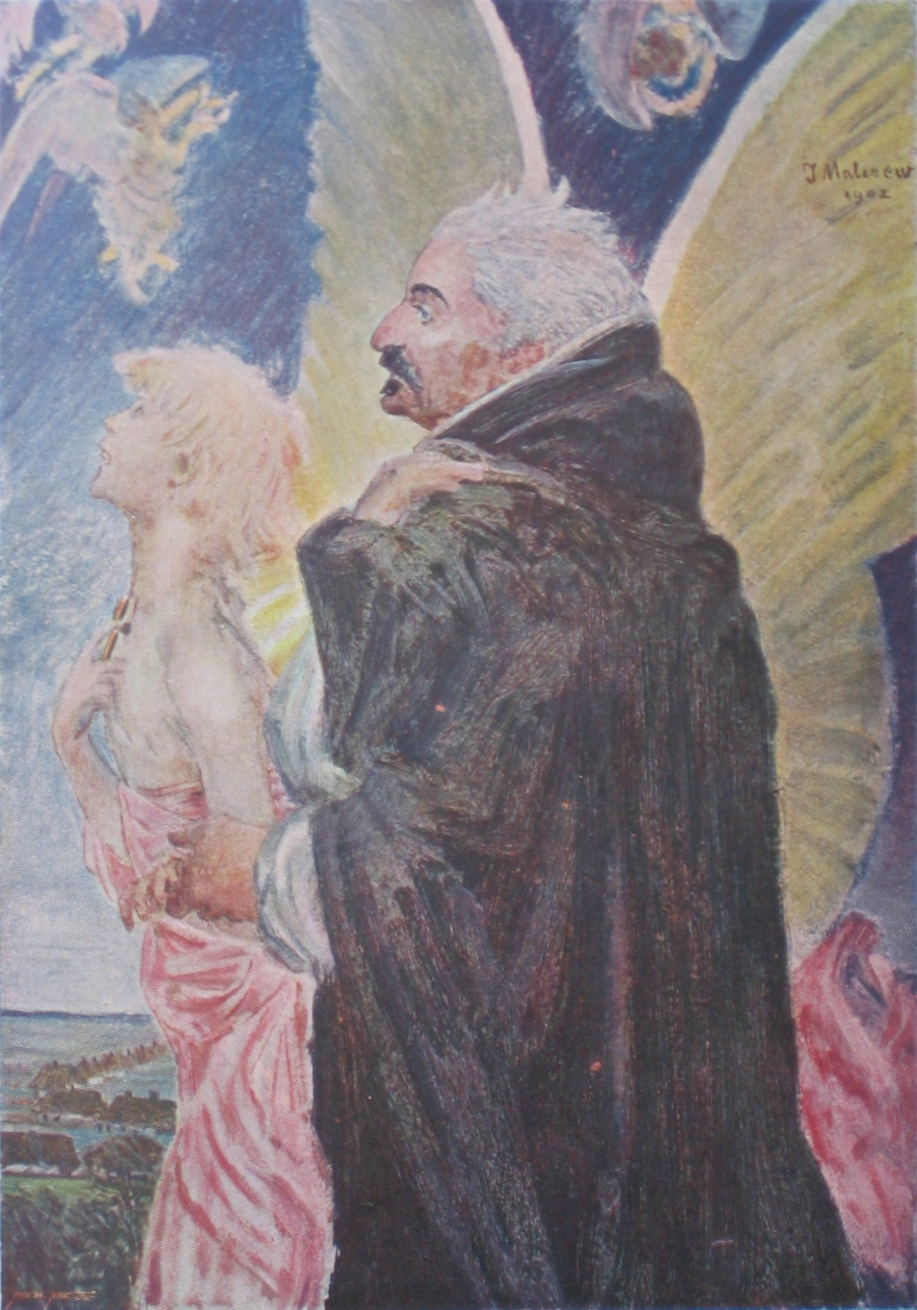 Ignacy Maciejowski (1835-1901, pseudonym Sewer), Polish writer